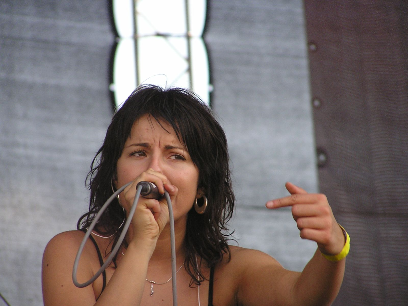 Katarína Knechtová - sing, guitar / Prague - Letenská pláň